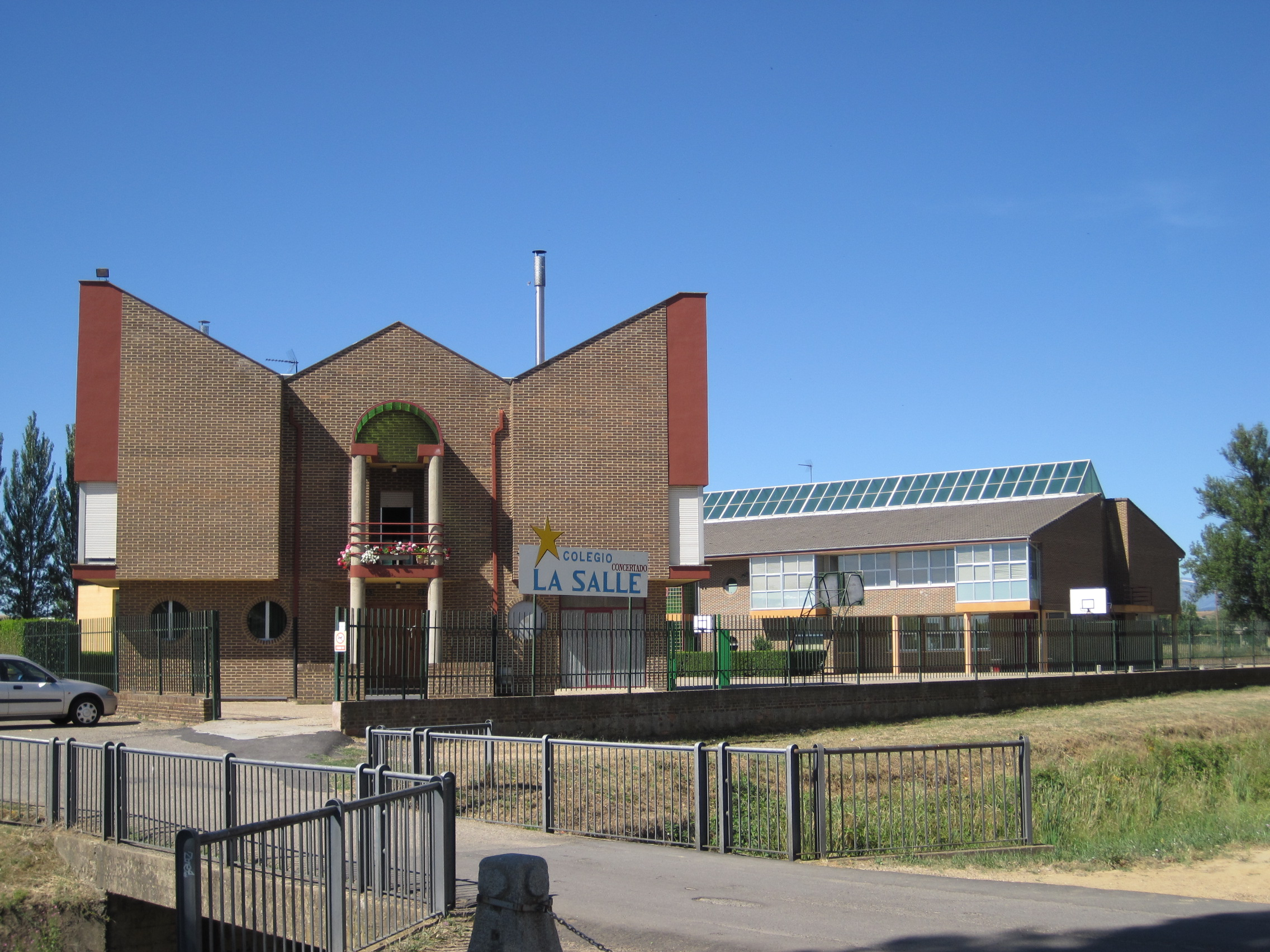 Colegio La Salle, en Astorga (León, España).